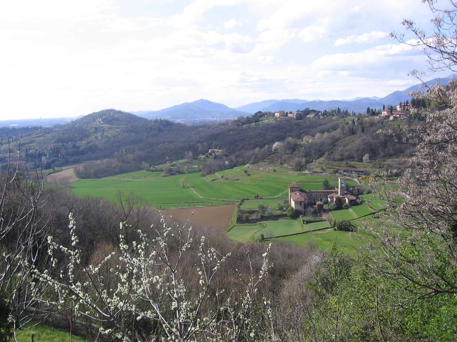 Valle di Astino, Bergamo, Italy